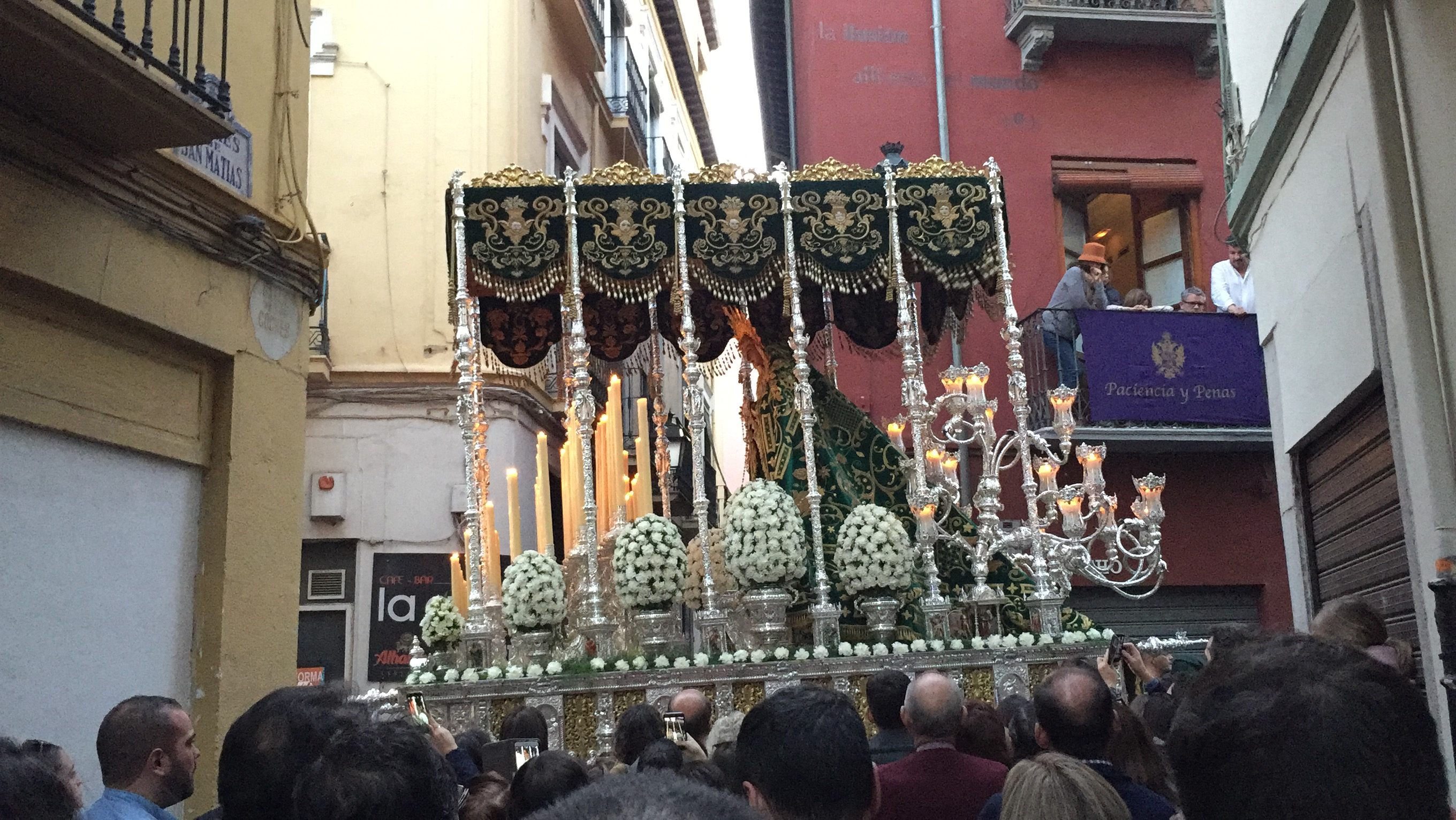 Esperanza